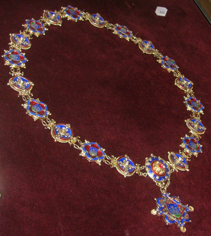 Počasni lanac načelnika slobodnog i kraljevskog glavnog grada Zagreba, prema nacrtu Hermana Bollea izradio zlatar Slavoljub Bulvan, Zagreb, 1902. (Muzej grada Zagreba)